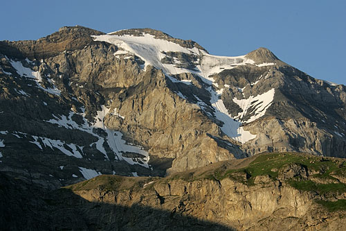 Clariden vom Urnerboden her gesehen